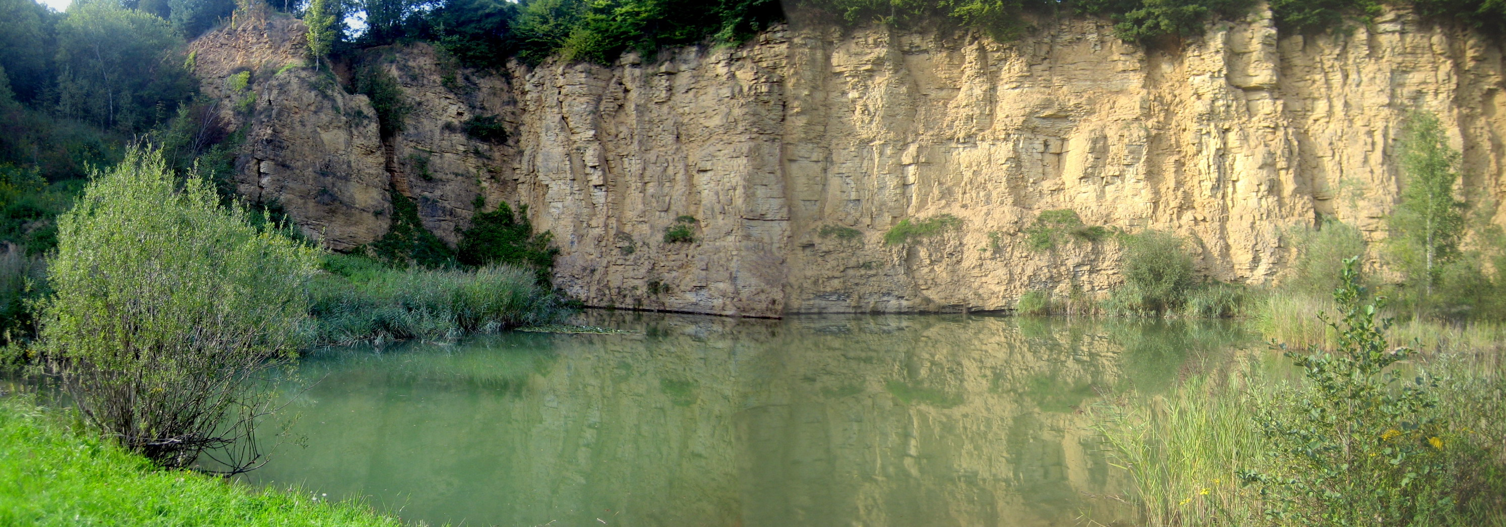 Eschelbronn, Steinbruch im Kallenberg